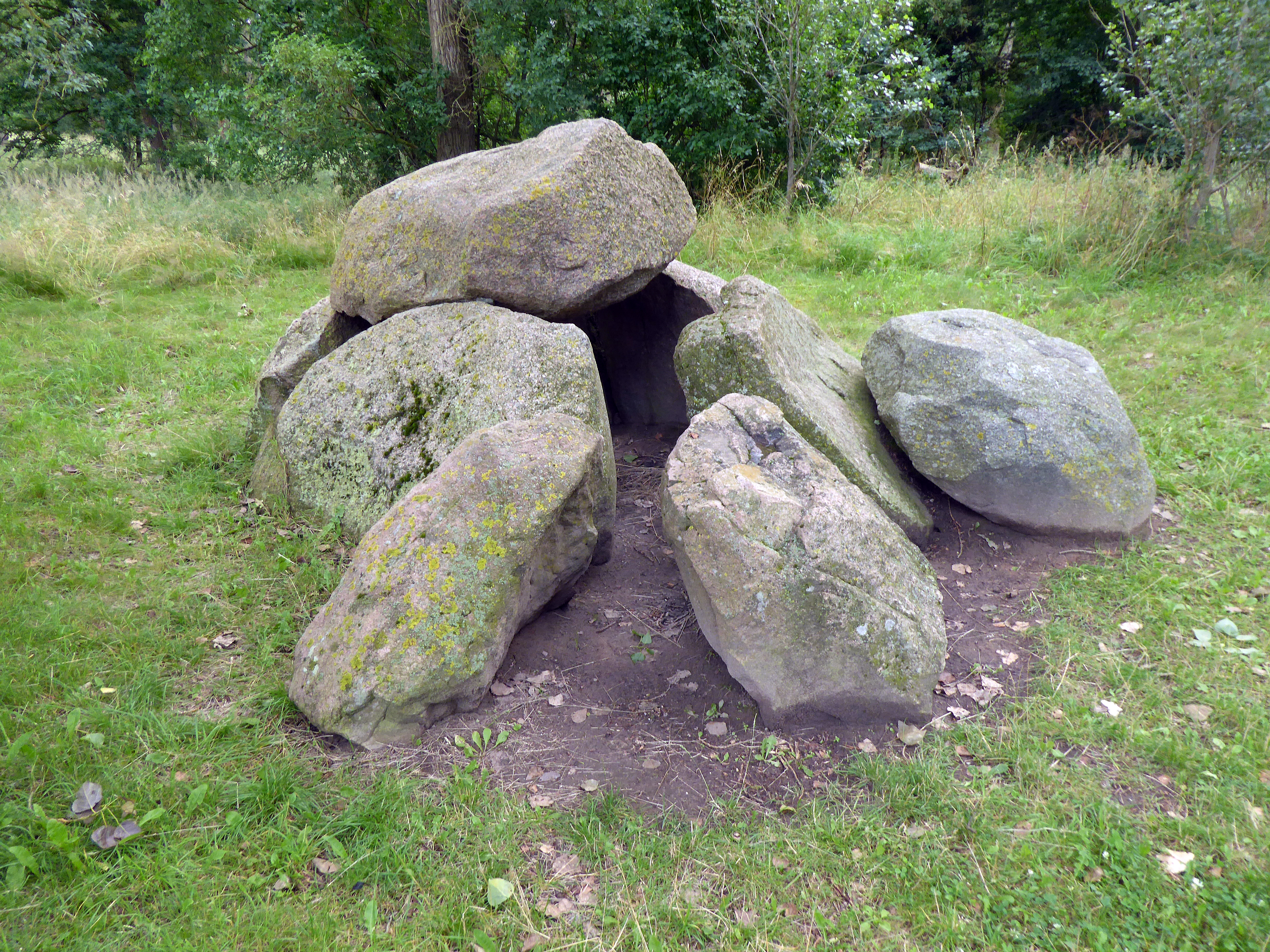 Großsteingrab Mechelsdorf 3 bei Rerik, Mecklenburg-Vorpommern. Südsüdwestliche Ansicht.